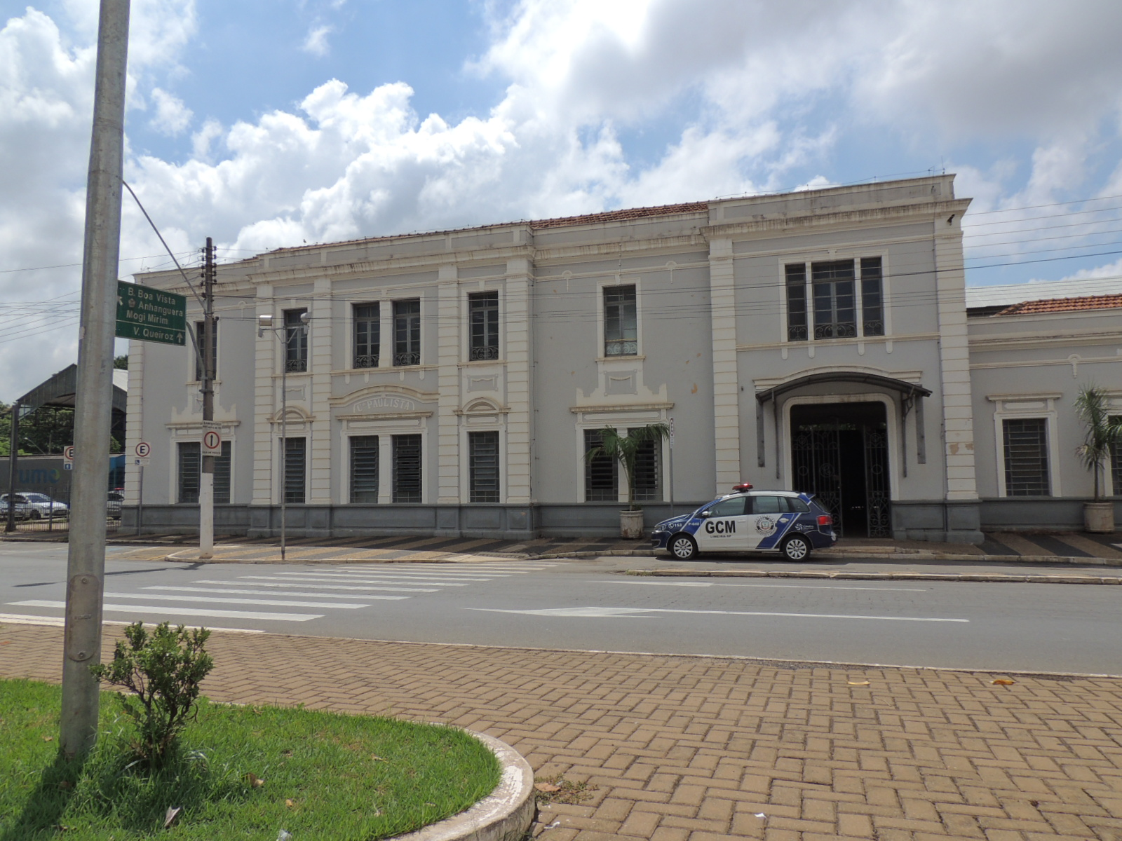 Centro, Limeira - SP, Brazil